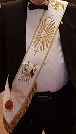 Inspector General 33°